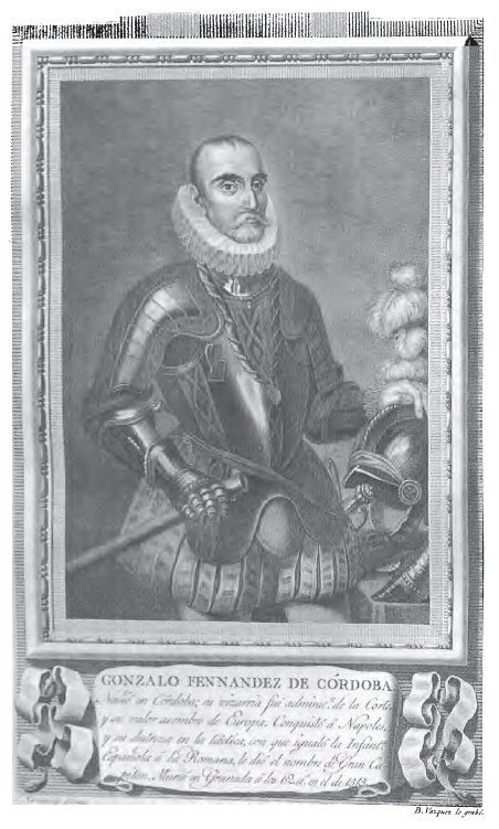 Retrato de Gonzalo Fernández de Córdoba, grabado de puntos de Bartolomé Vázquez según dibujo de José Ximeno.